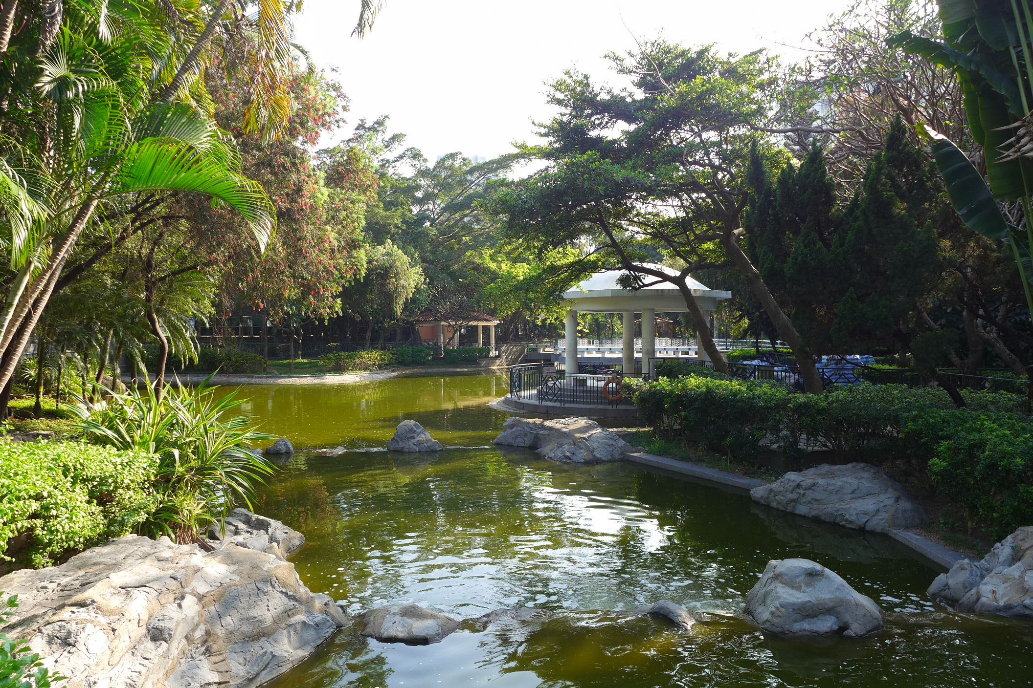 Tung Chau Street Park Pond